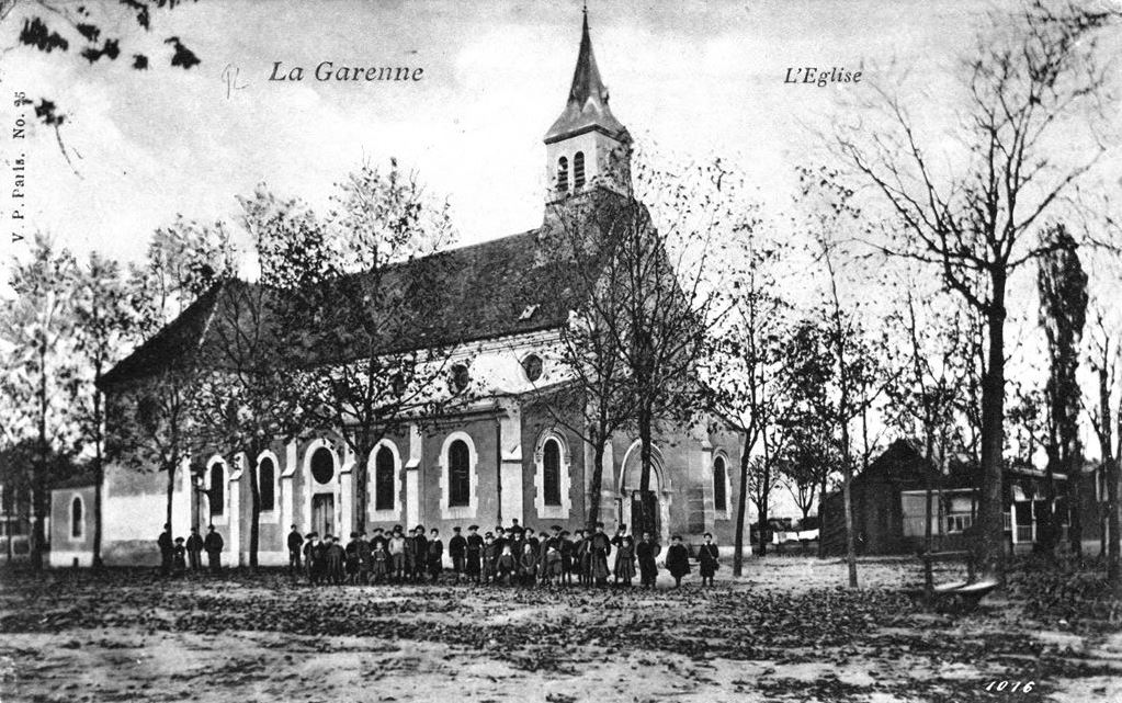 La Garenne-Colombes, Eglise Saint-Urbain, 1905